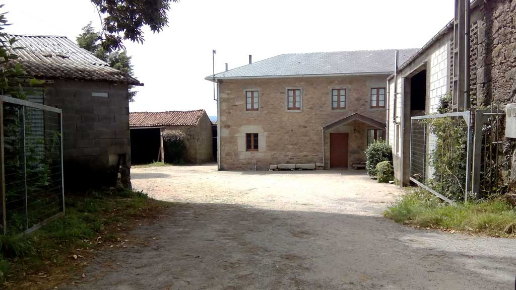 Vista de Pardiñeiras, Curtis.